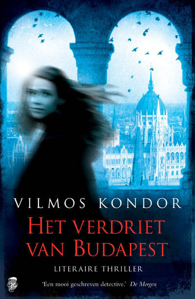 Kondor Vilmos Bűnös Budapest című regényének borítója, holland kiadás (Agave kiadó)